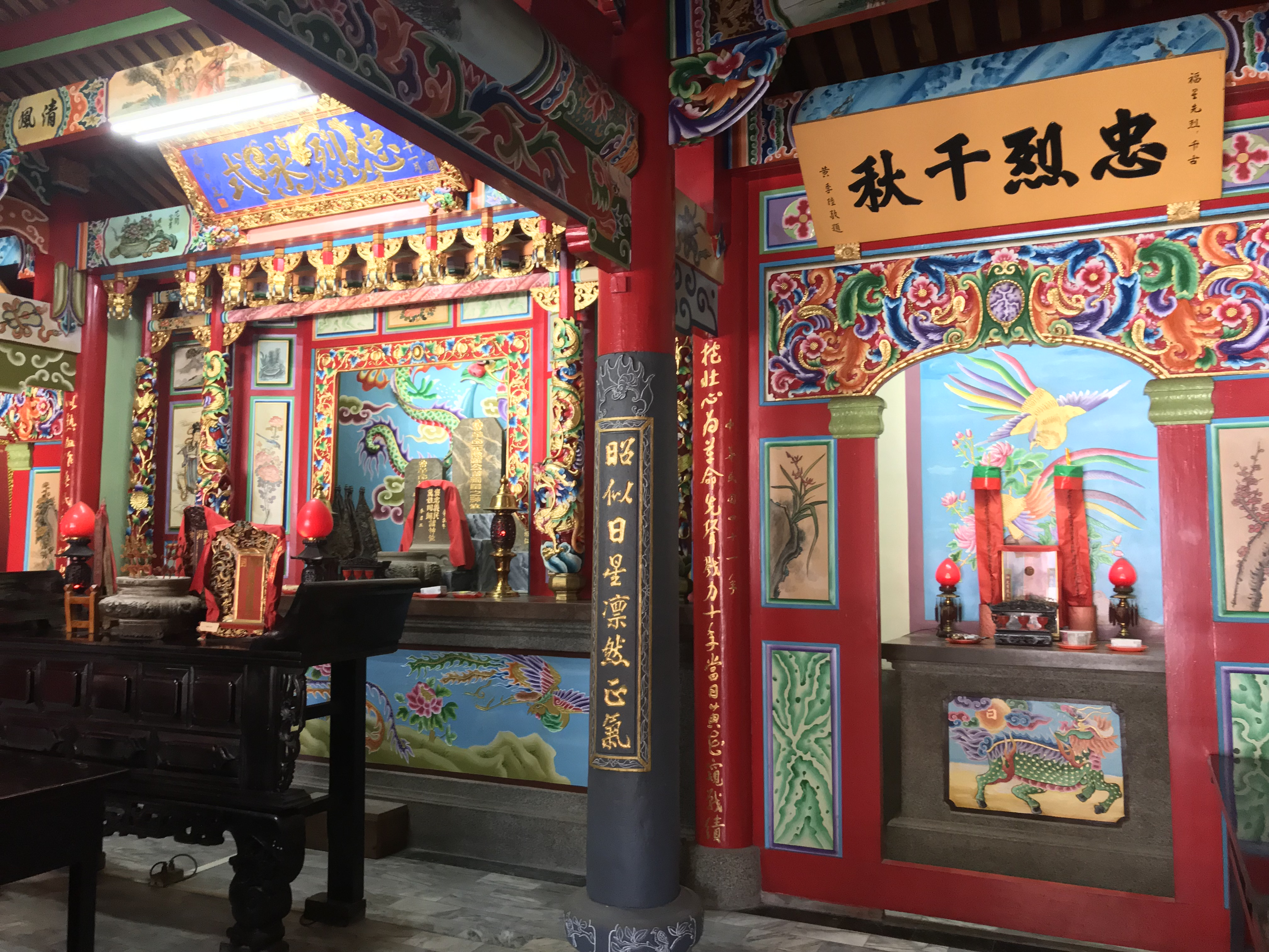 中文（台灣）: 大湖義民廟內部